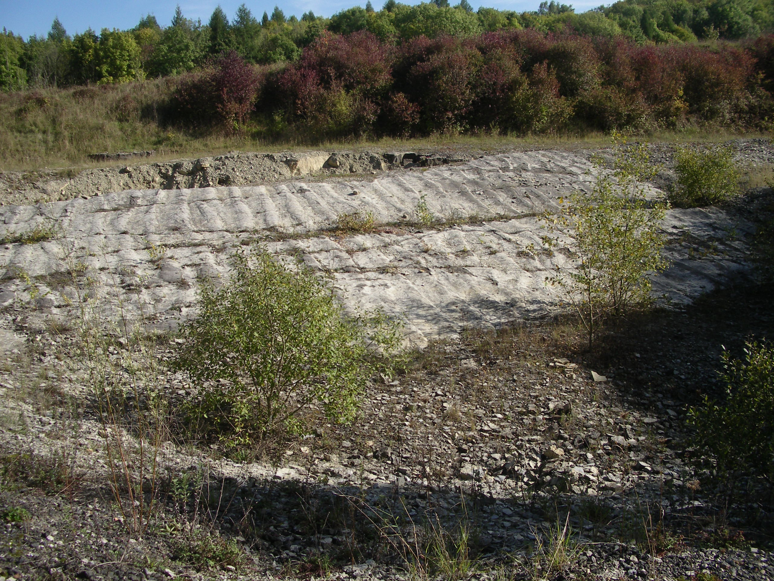 Die Rippelmarken aus dem Unteren Muschelkalk liegen im Göttinger Wald im Forststeinbruch in Herberhausen. Die Rippel sind ca. 240 mio Jahre alt und bildeten den Grund des flachen Muschelkalkmeers, einem Nebenmeer der Tethys.